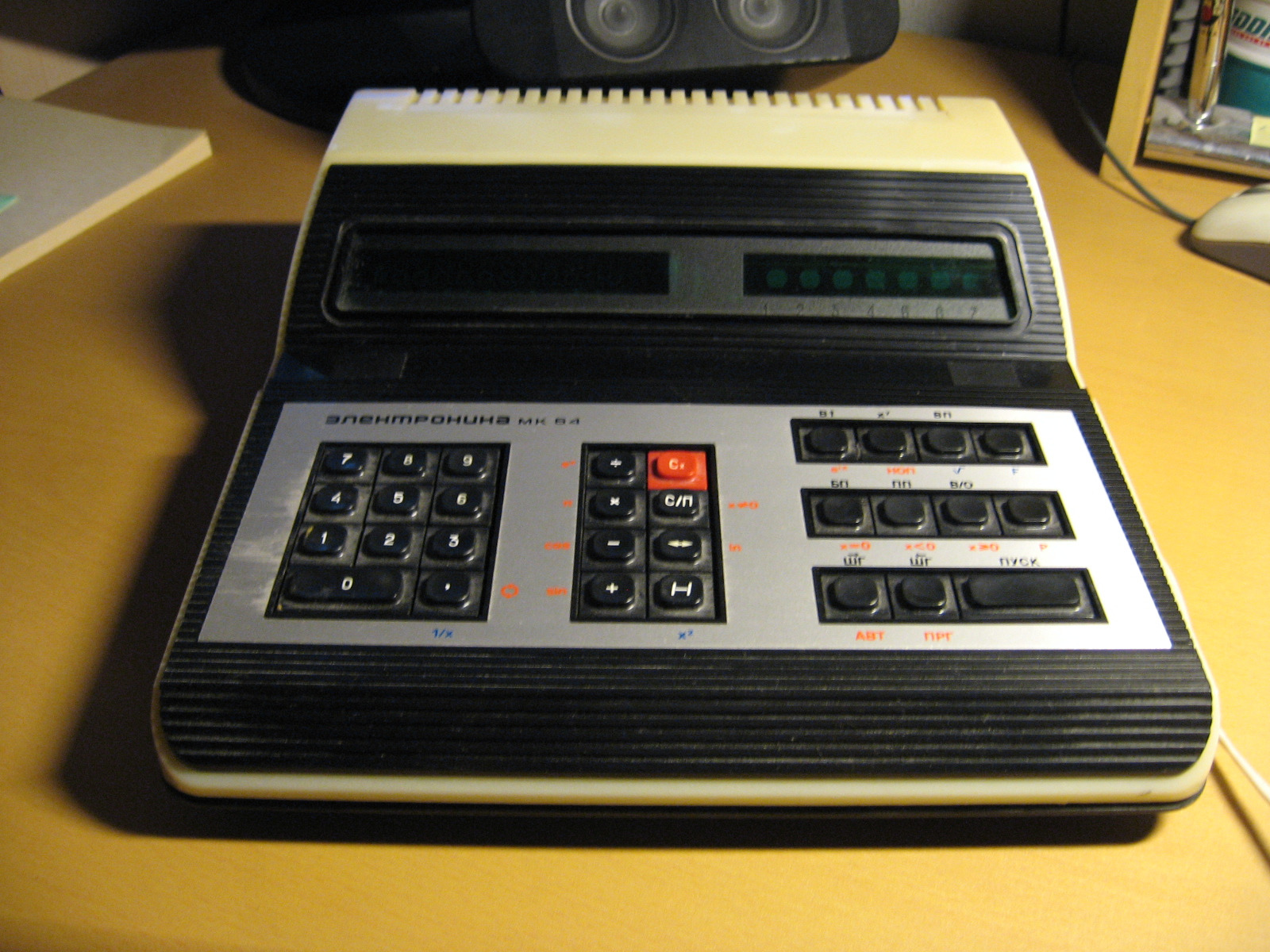 NSVL kalkulaator (programmeeritav)